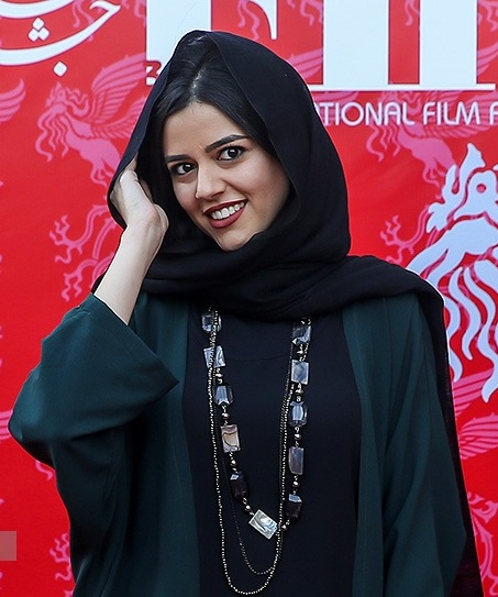 ماهور الوند در اختتامیه سی و ششمین جشنواره جهانی فیلم فجر